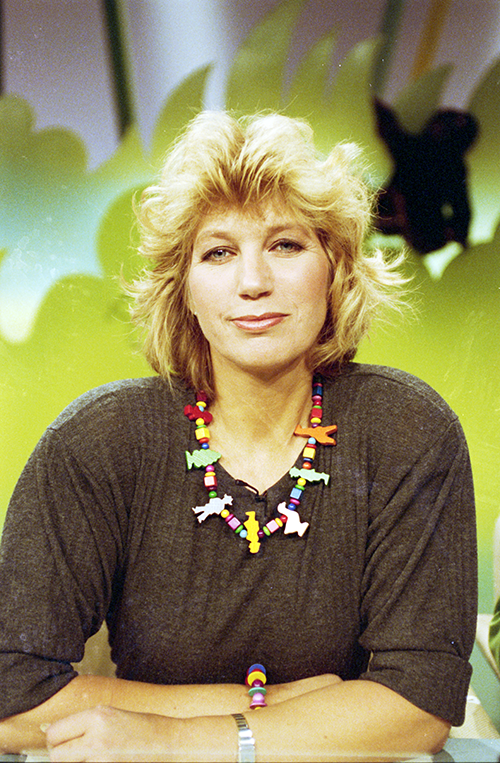 Sjoukje Smit (Maggie MacNeal)